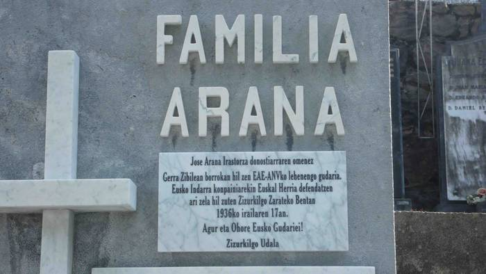 Jose Arana Irastorzaren omenez Donostiako Polloeko hilerrian familiaren panteoian jarritako plaka